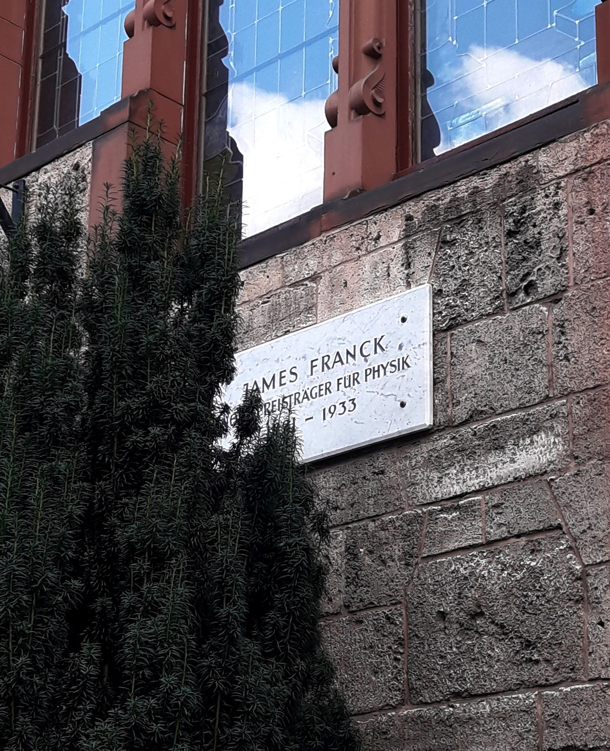 Göttingen (Merkelstraße 4, 37085 Göttingen): Göttinger Gedenktafel für James Franck